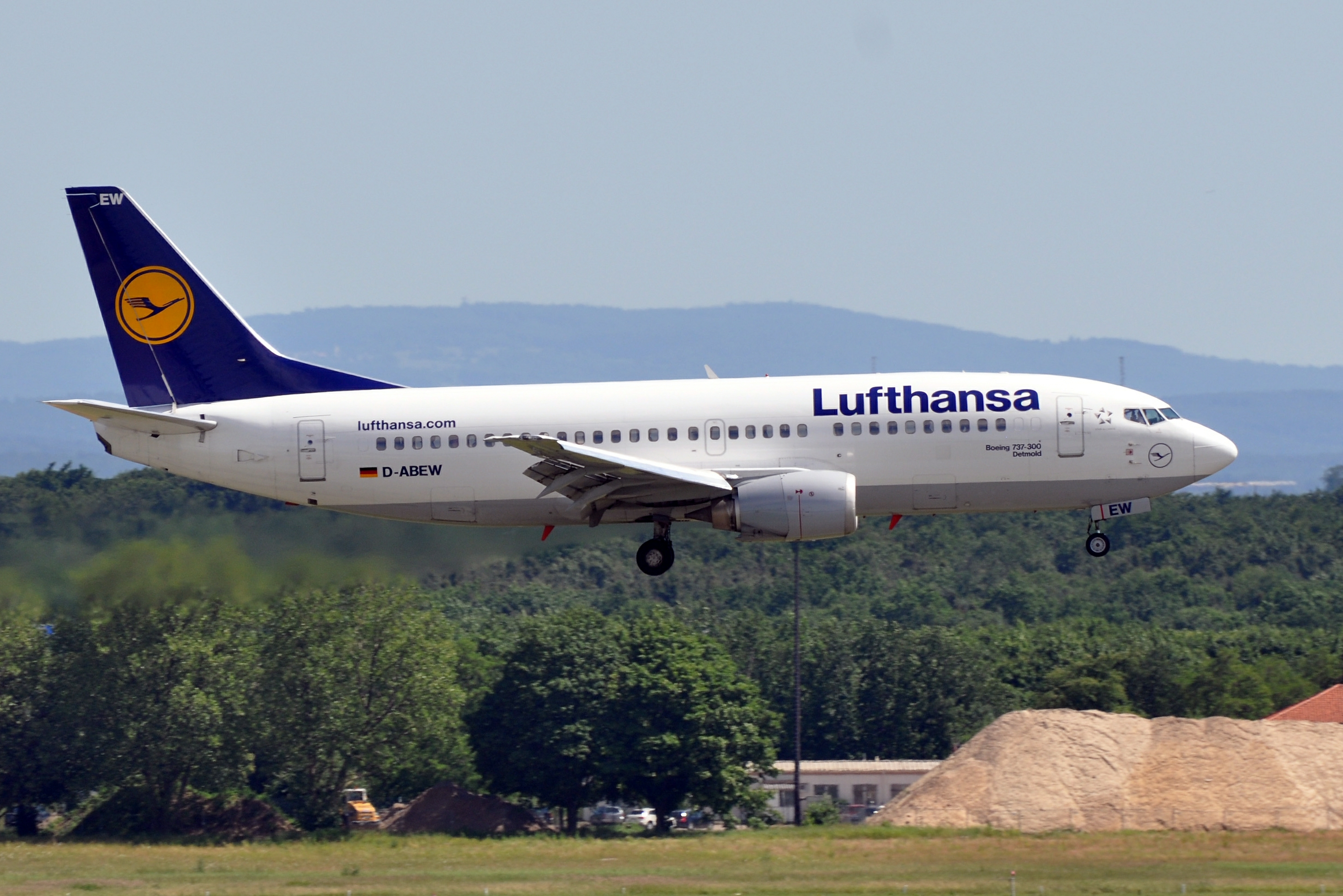 MSN 27905 B737-330 LUFTHANSA FRA